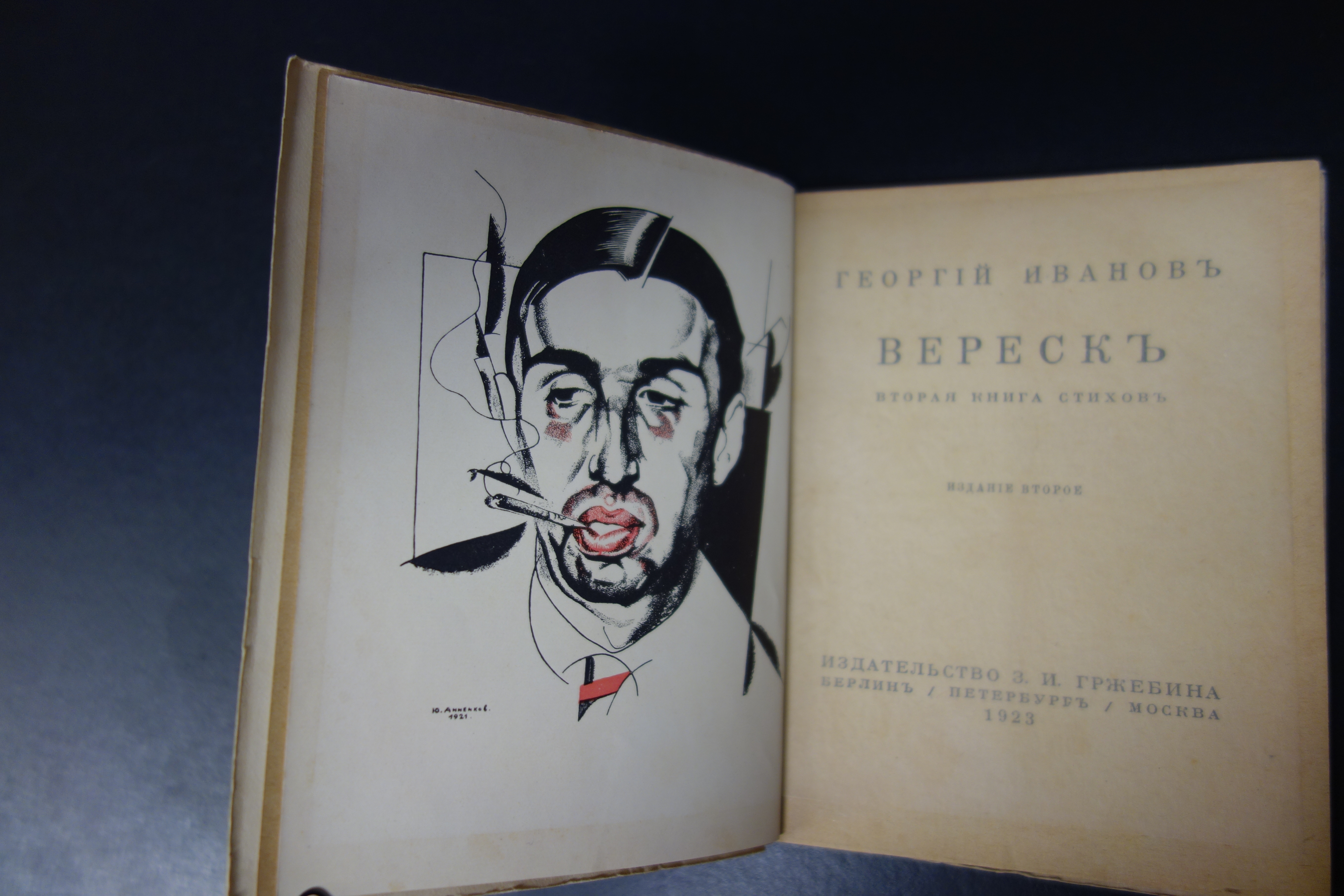 Gerogij Ivanov Weresk-Вереск- Titelseite, transparentes Schutzpapier, Frontispiz von Annenkow - Ivanov zeigend - Berlin 1923 Buchformat 10 x 14,5 cm, Klein-Oktav, 86 Seiten Frontispiz von Annenkow Juri Annenkow